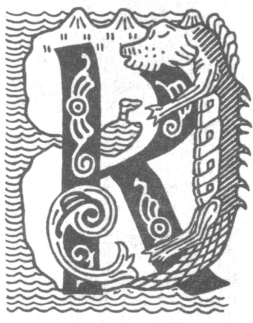 Gerhard Munthe: Illustration for Ynglingesaga. Snorre 1899-edition. 1 Initial: «KRINGLA HEIMSINS - den runde jordskiva - som menneskene bor på, er mye innskåret av havet, store havbukter går fra uthavet inn i landet.»